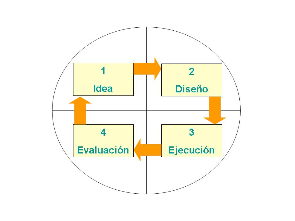 Ciclo de un proyecto de desarrollo